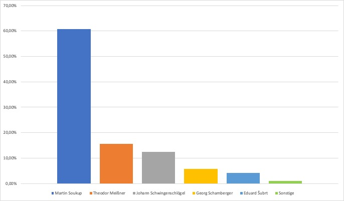 Reichsratswahl 1907 Wahlbezirk Böhmen 126 Diagramm